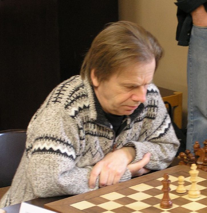 GM Ulf Andersson (Sweden)